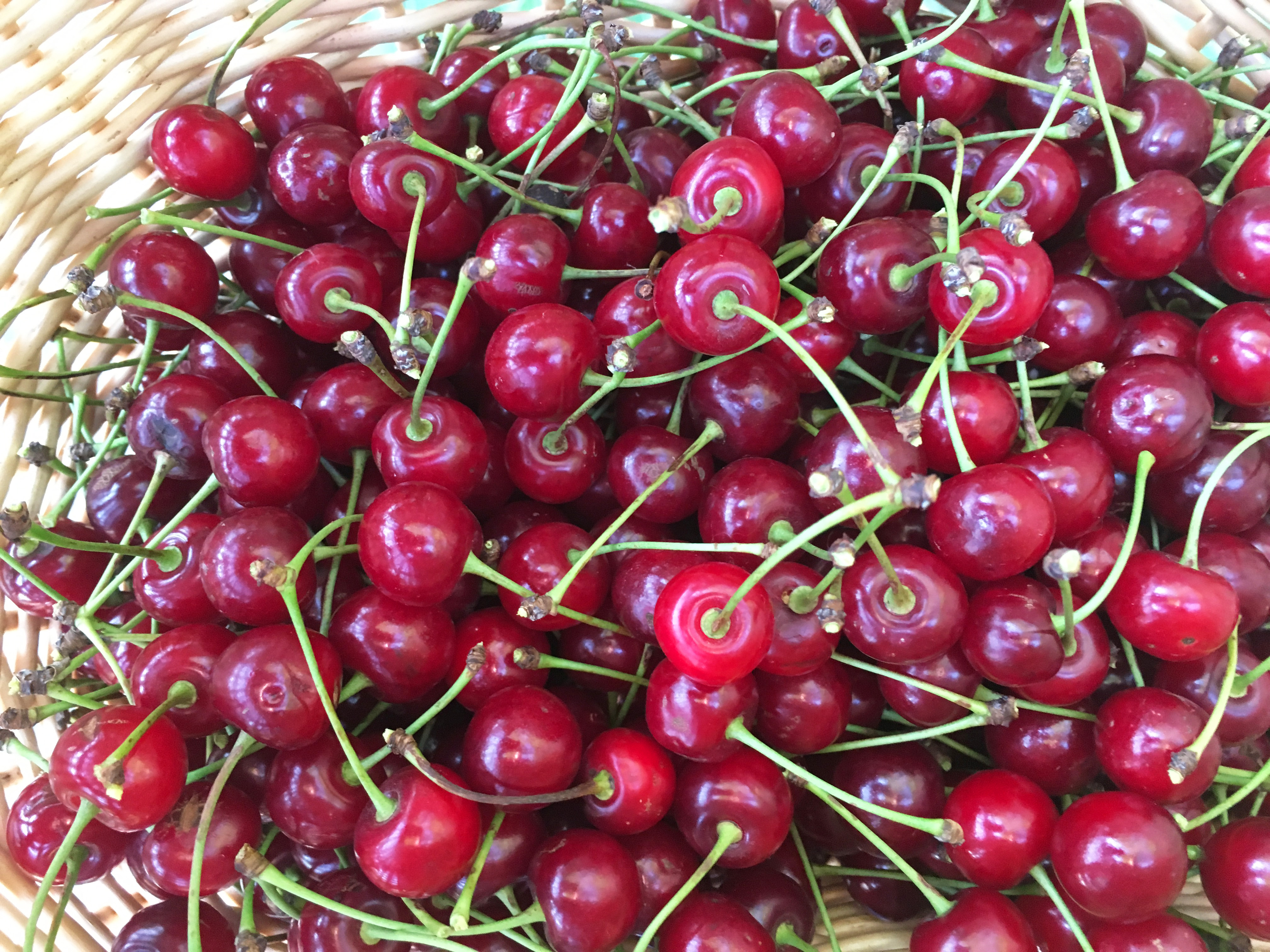 Von Hand gepflückte (schwäbisch: gebrockte) Weichseln.